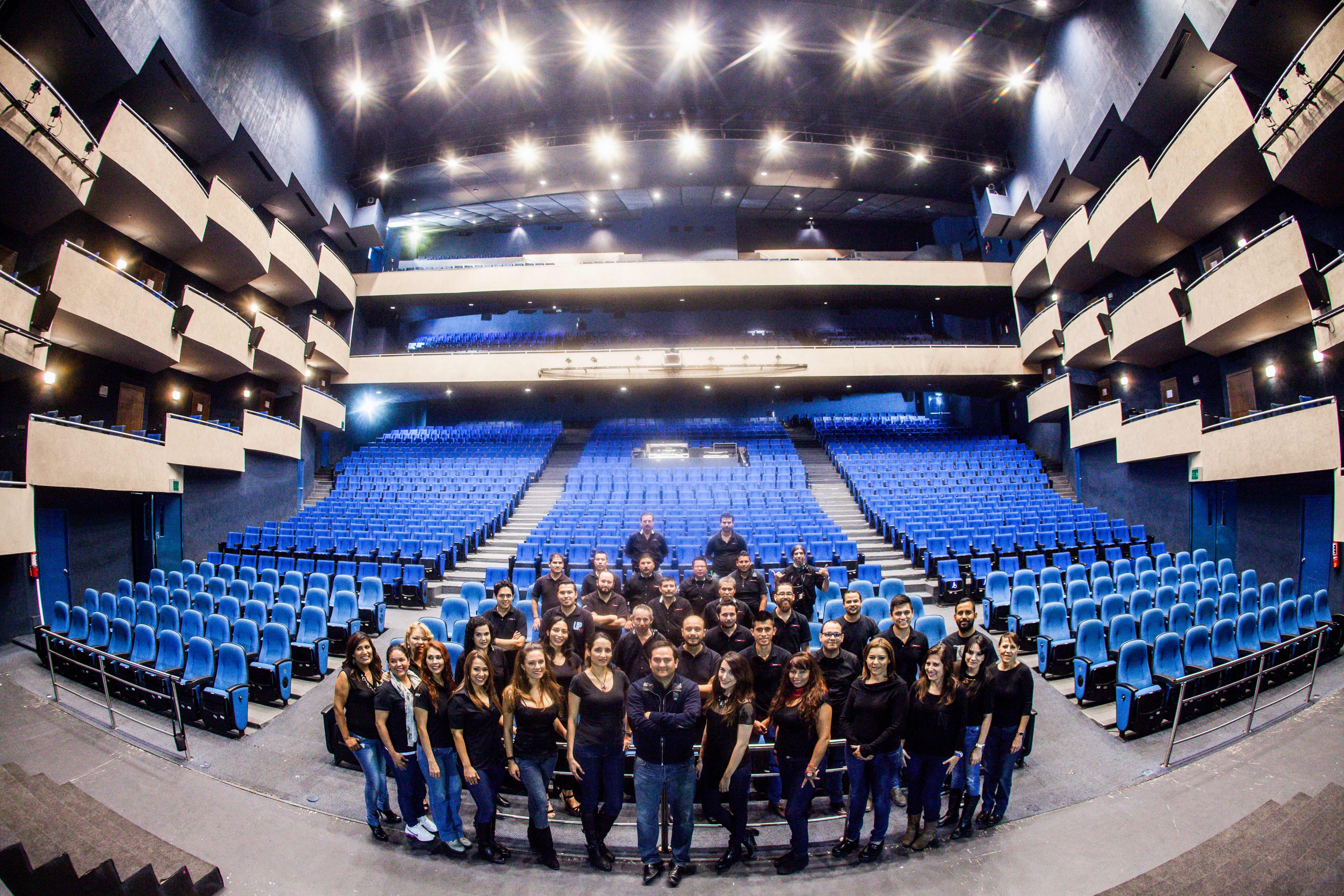 Fotografía: Yorch Gómez